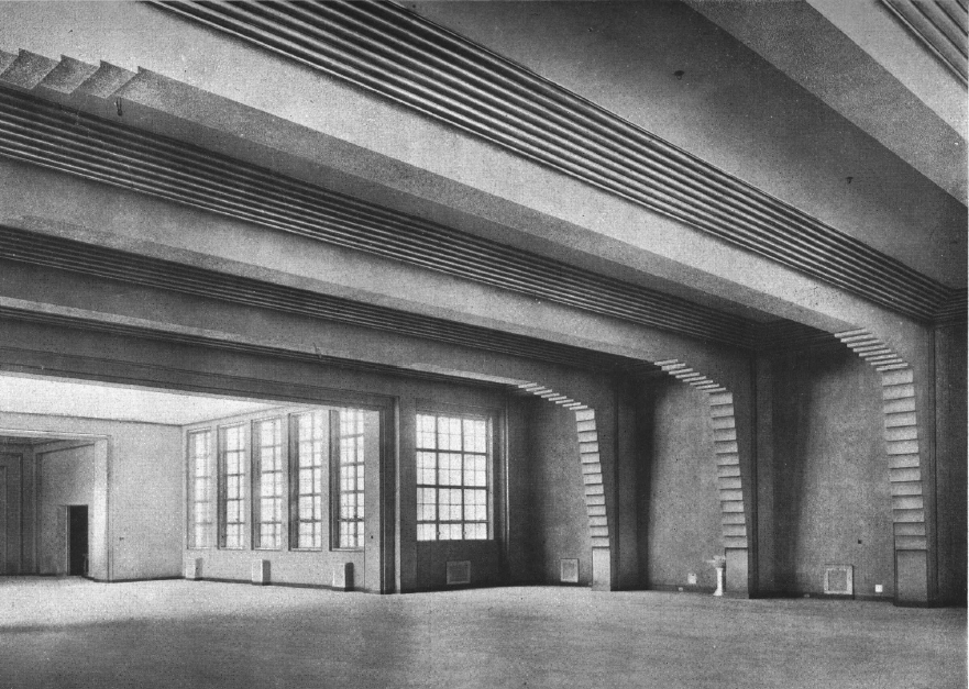 Sala de contabilidad de la casa matriz del Banco El Hogar Argentino en Buenos Aires. Calle Bartolomé Mitre 575, arq. Alejandro Virasoro.